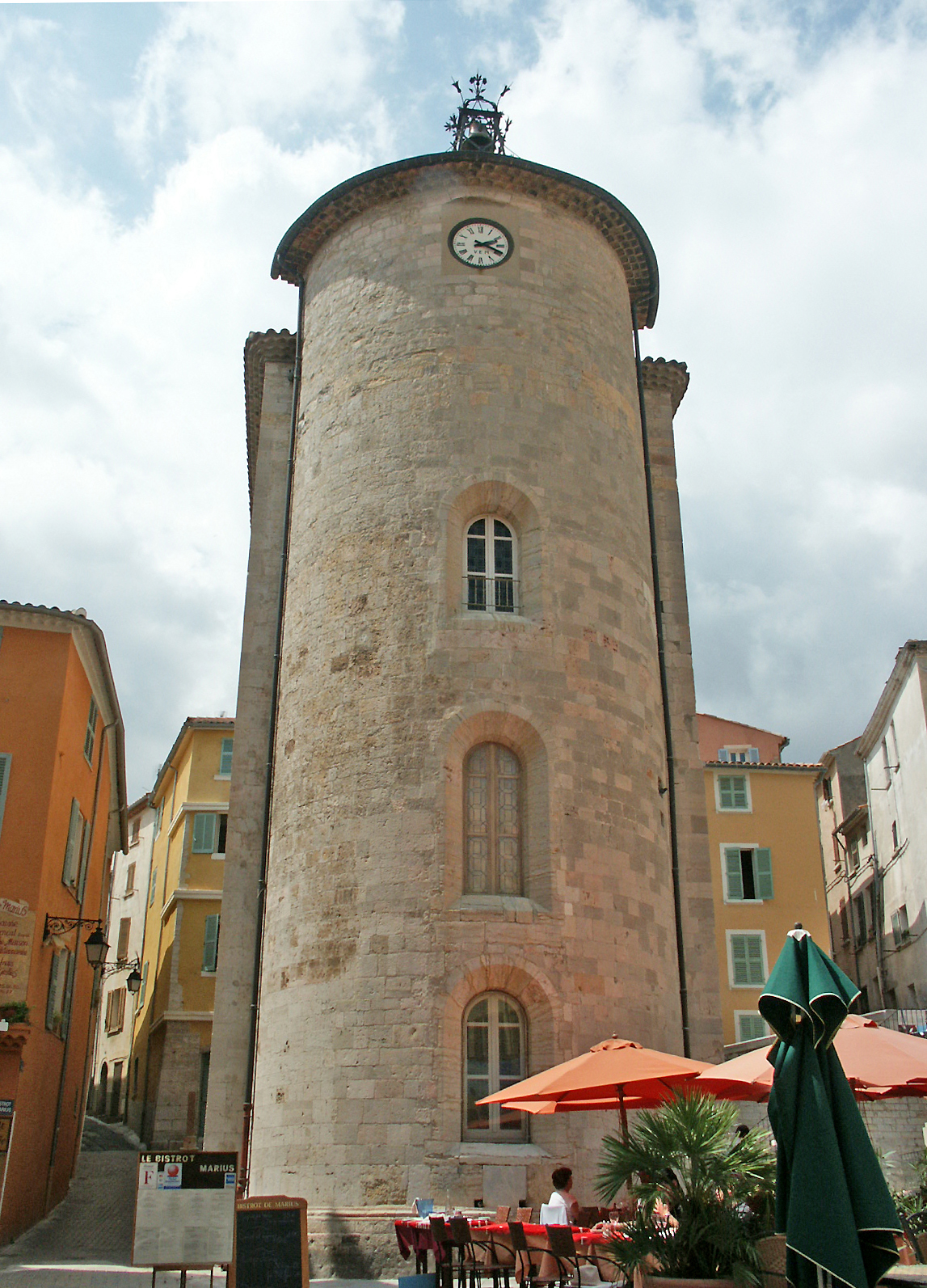 Hyères, la tour Saint-Blaise appelée aussi tour des Templiers. C'est le seul vestige de la commanderie que les Templiers ont créée là au XIIe siècle, à l'époque hors les murs de la ville.